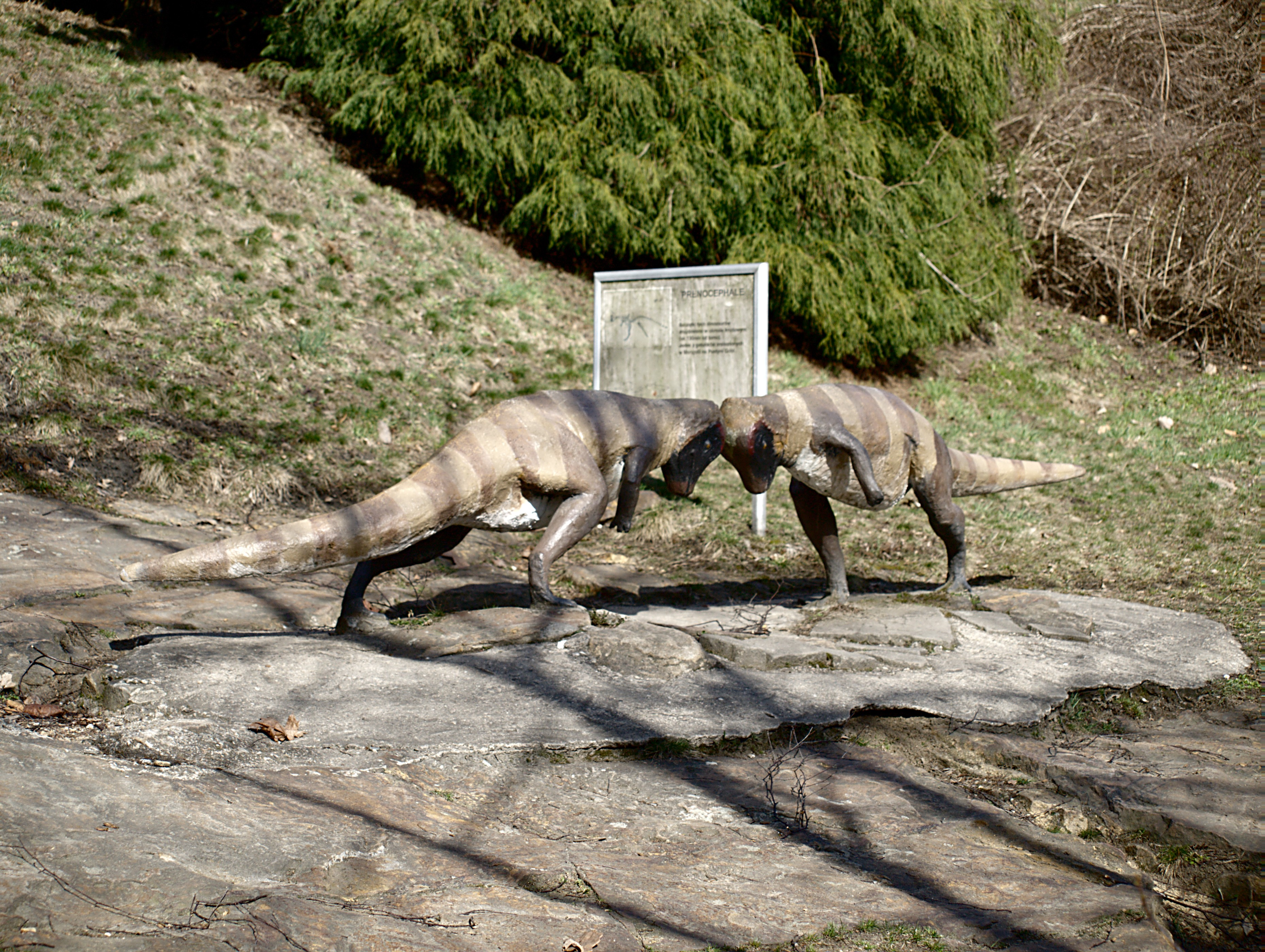 Chorzowskie Zoo. Kotlina dinozaurów. Prenocefale.